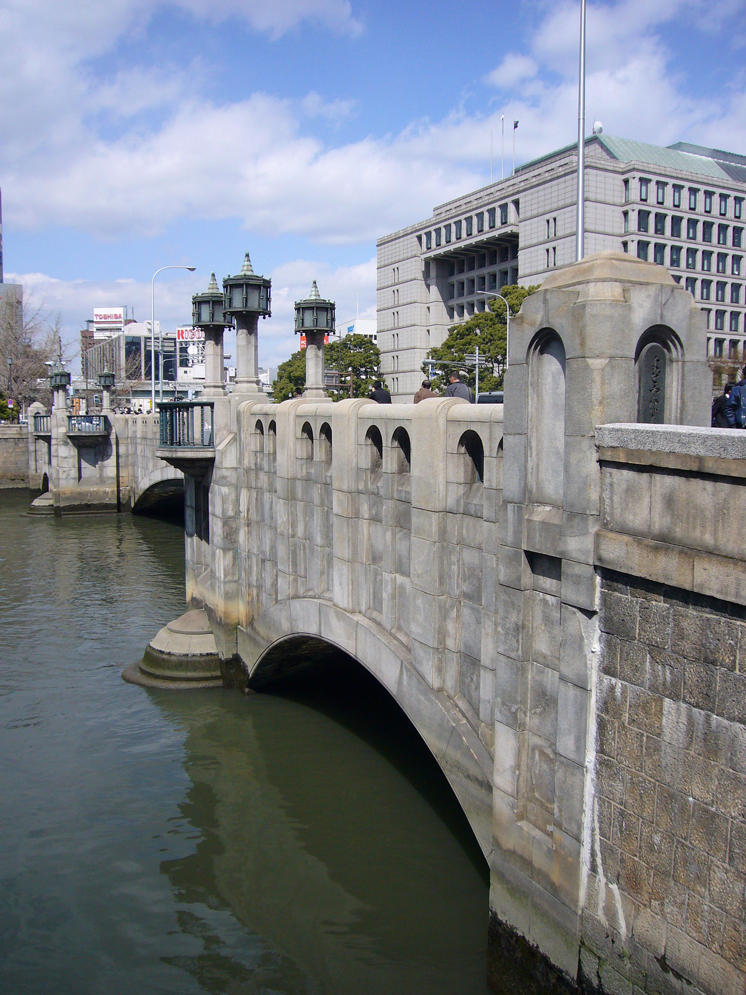 Yodoyabashi Bridge in Osaka, Japan